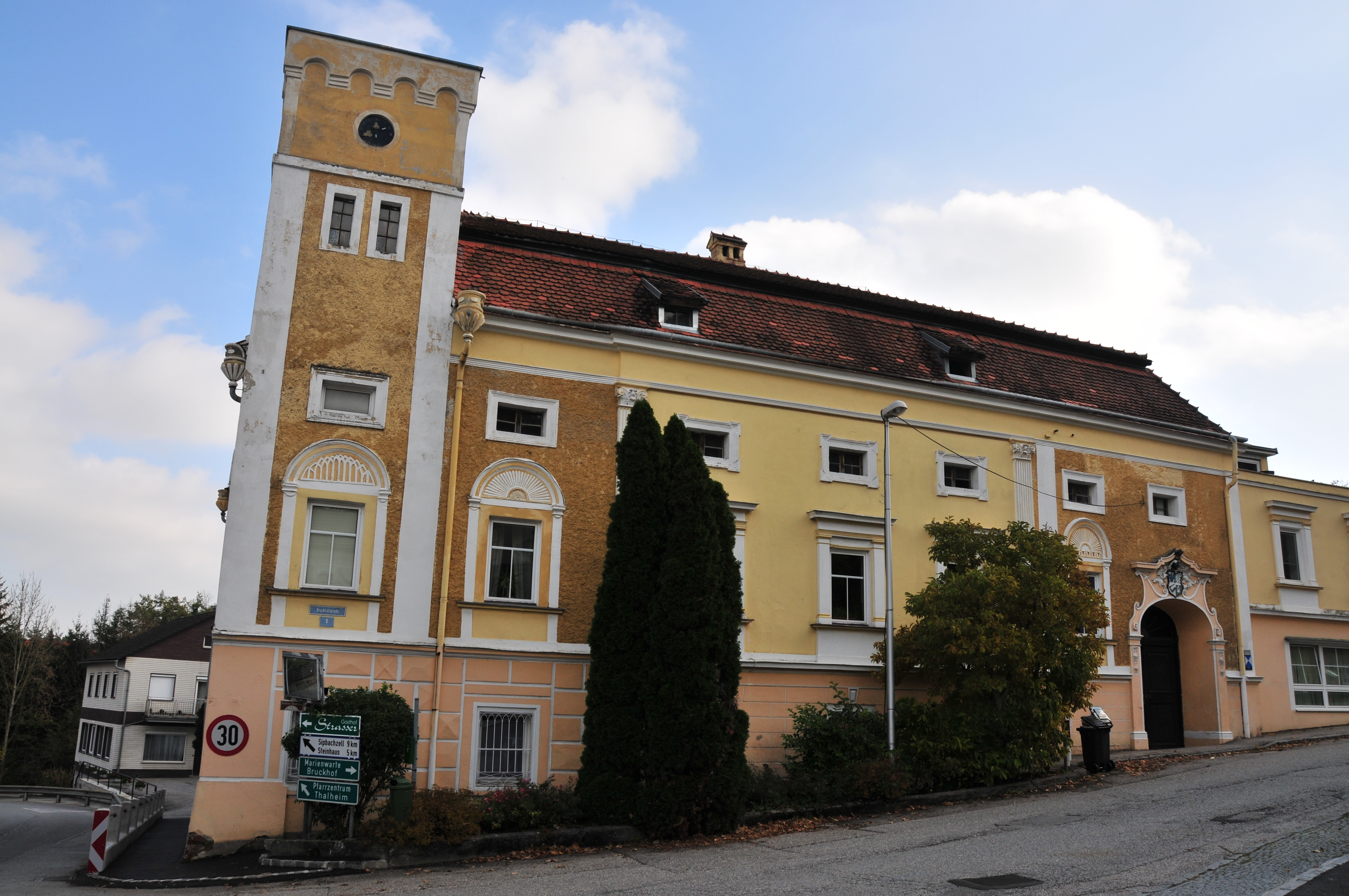 Schloss Aigenegg